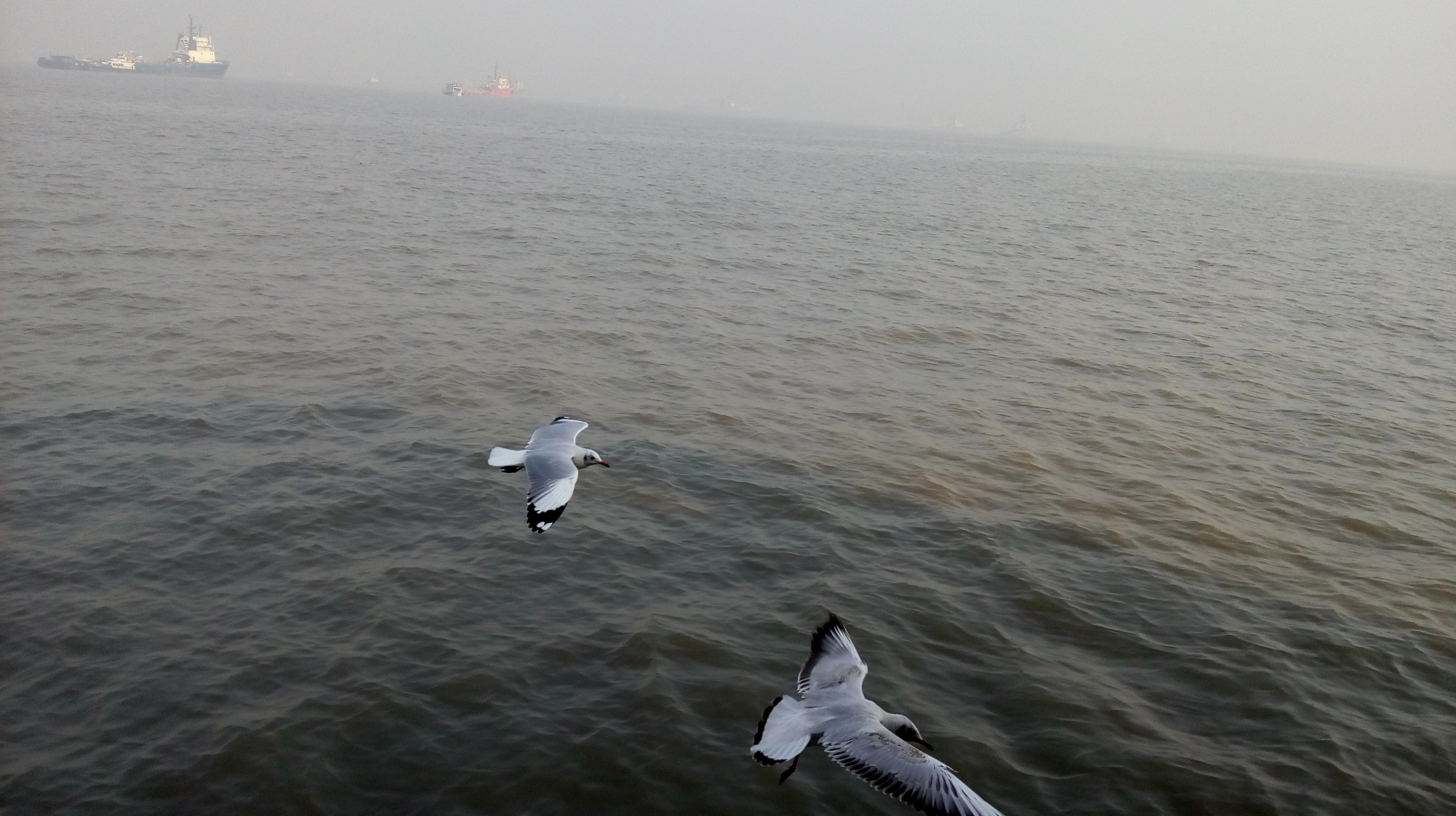 एलिफन्टा कॅव्हेस छायाचित्रे